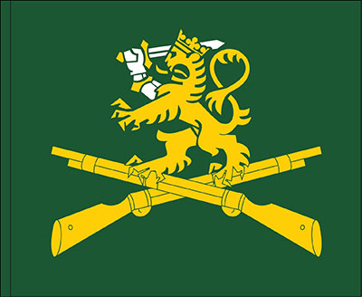 Jalkaväkikoulun lippu, vahvistettu 2017. Suunnitellut Markku Palokangas, piirtänyt Lauri Paju.